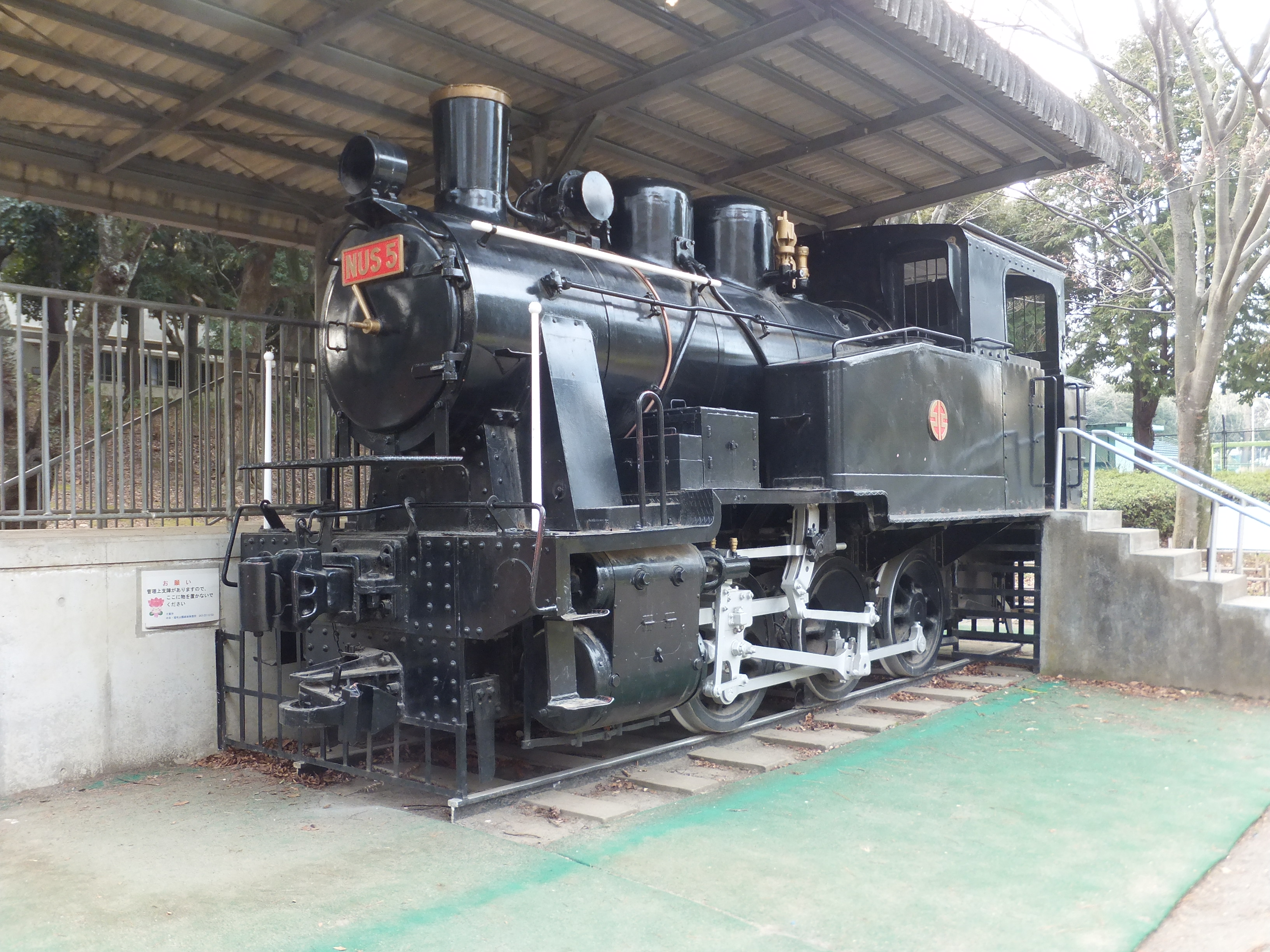 昭和36年から44年まで川崎製鉄千葉製鉄所(現・JFEスチール東日本製鉄所 千葉地区)で資材運搬用に使用されていた小型C型蒸気機関車。現在は千葉市に寄贈され千葉公園で保存されている。